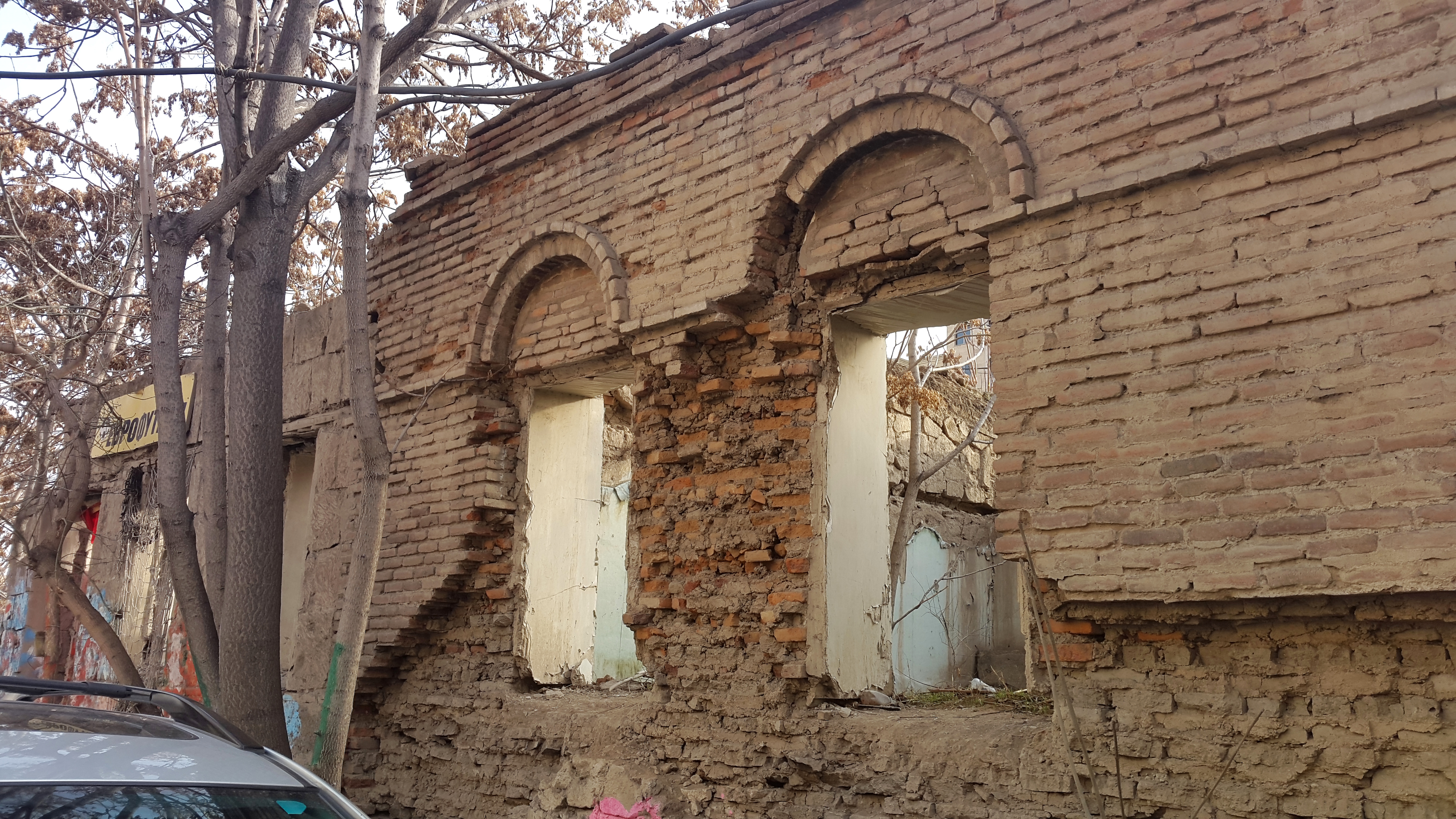 Հայֆիլմի շենքը